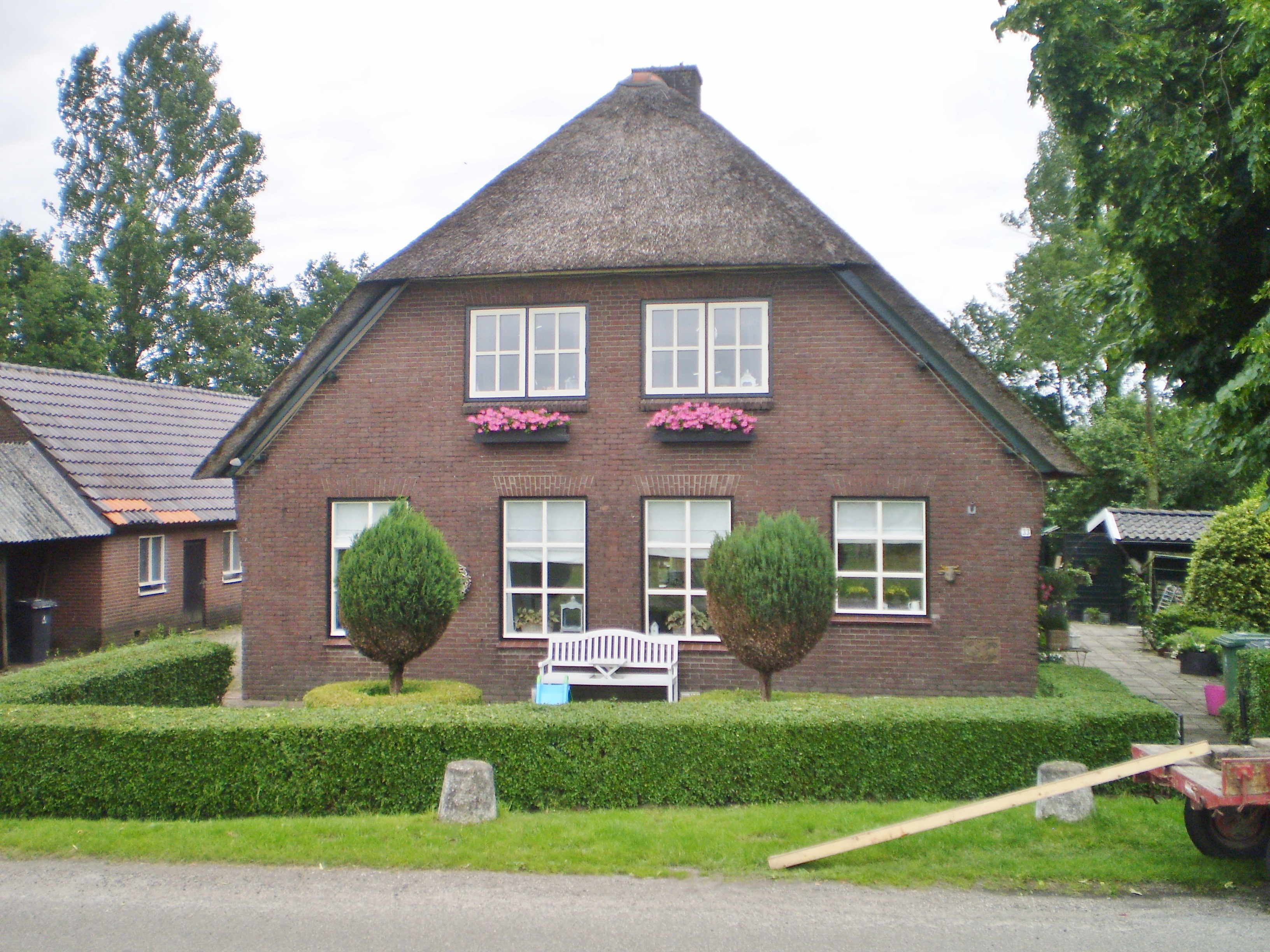 De weg slingert met de dijk mee langs de oever van de Eem. Aan de overkant van de Eem ligt Baarn. De voorloper van deze wederopbouwboerderij stond oorspronkelijk aan de Eemzijde van het Zuidereind.